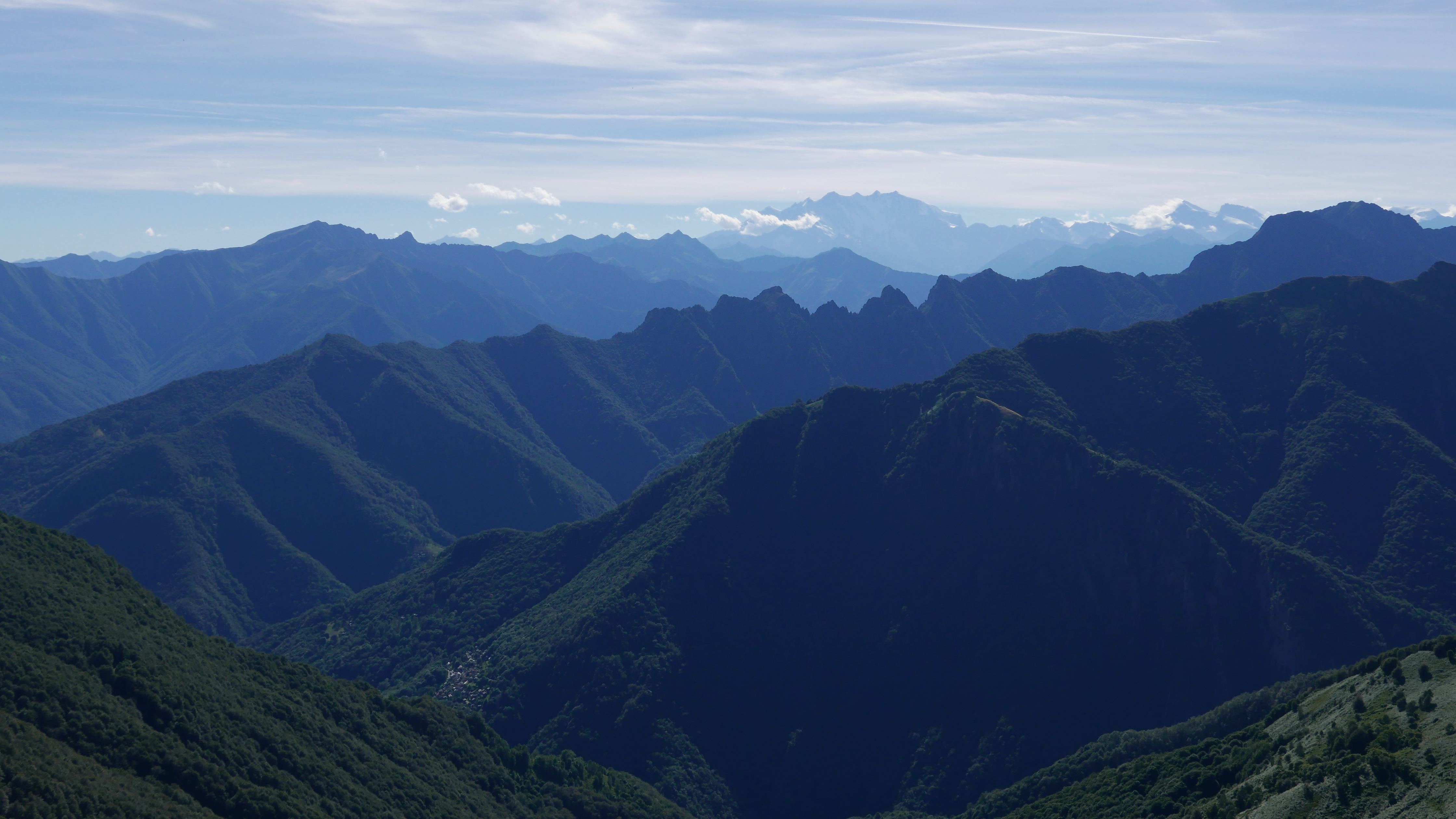 Parco Val Grande visto dal Pian Cavallone: Cicogna, Alpe Pra, Corni di Nibbio, Punta Proman, Monte Rosa